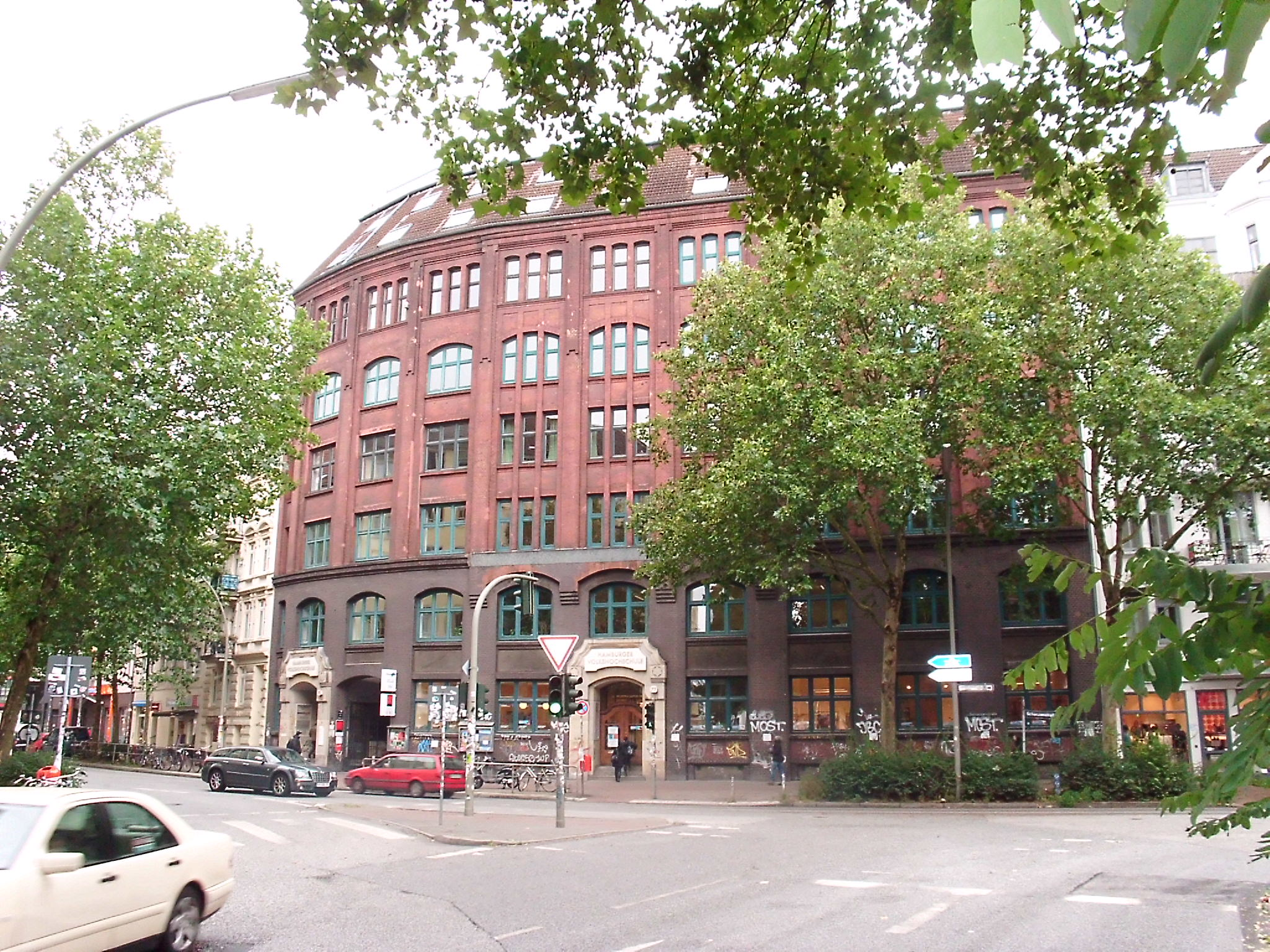 Gesamtanlage, bestehend aus dem zwischen 1897 und 1907 errichteten ehemaligen Fabrikkomplex „Montblanc“ zwischen Schanzenstraße und Bartelsstraße.This is a photograph of an architectural monument.